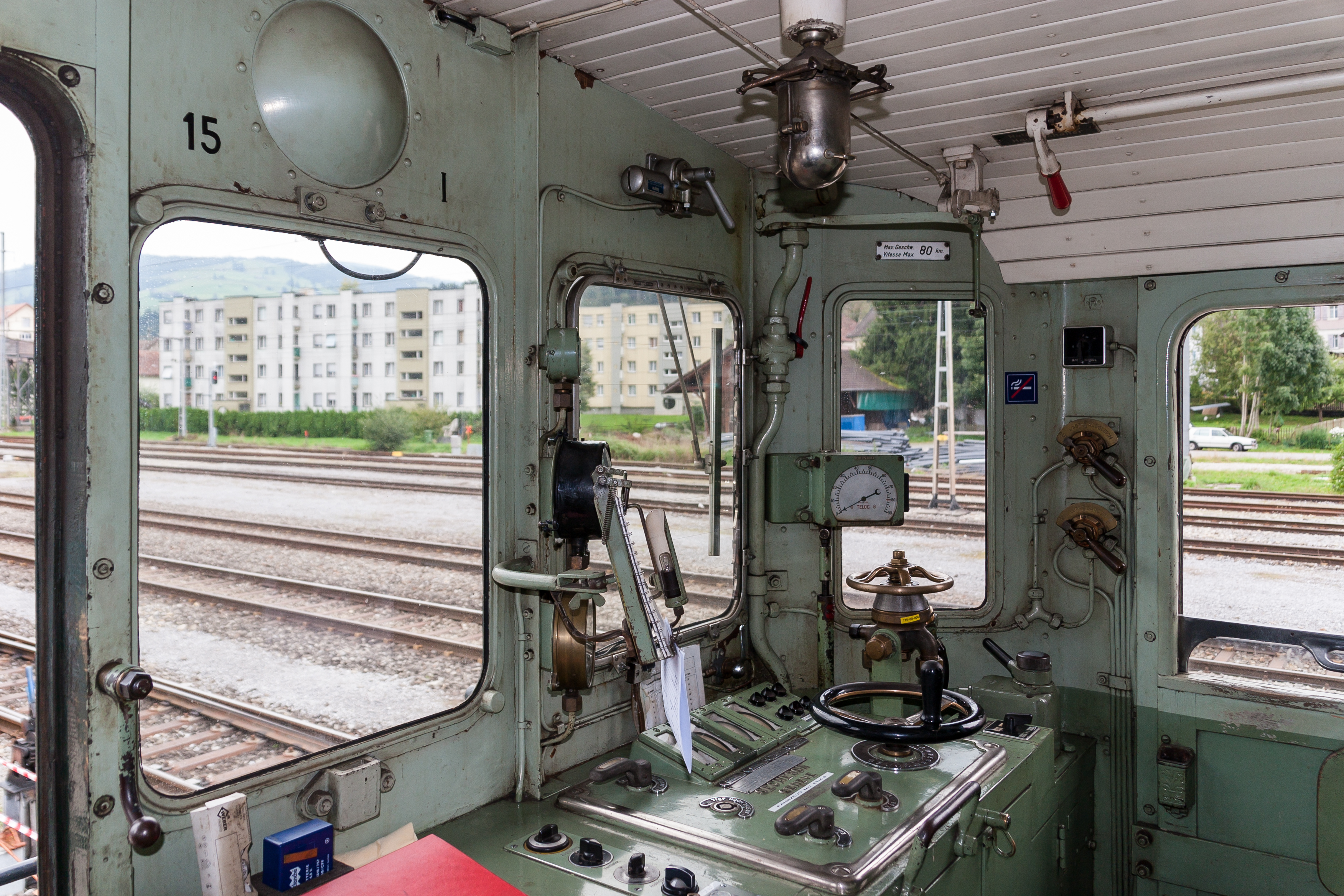 Blick in den Führerstand der BT Be 4-4 Nr. 15